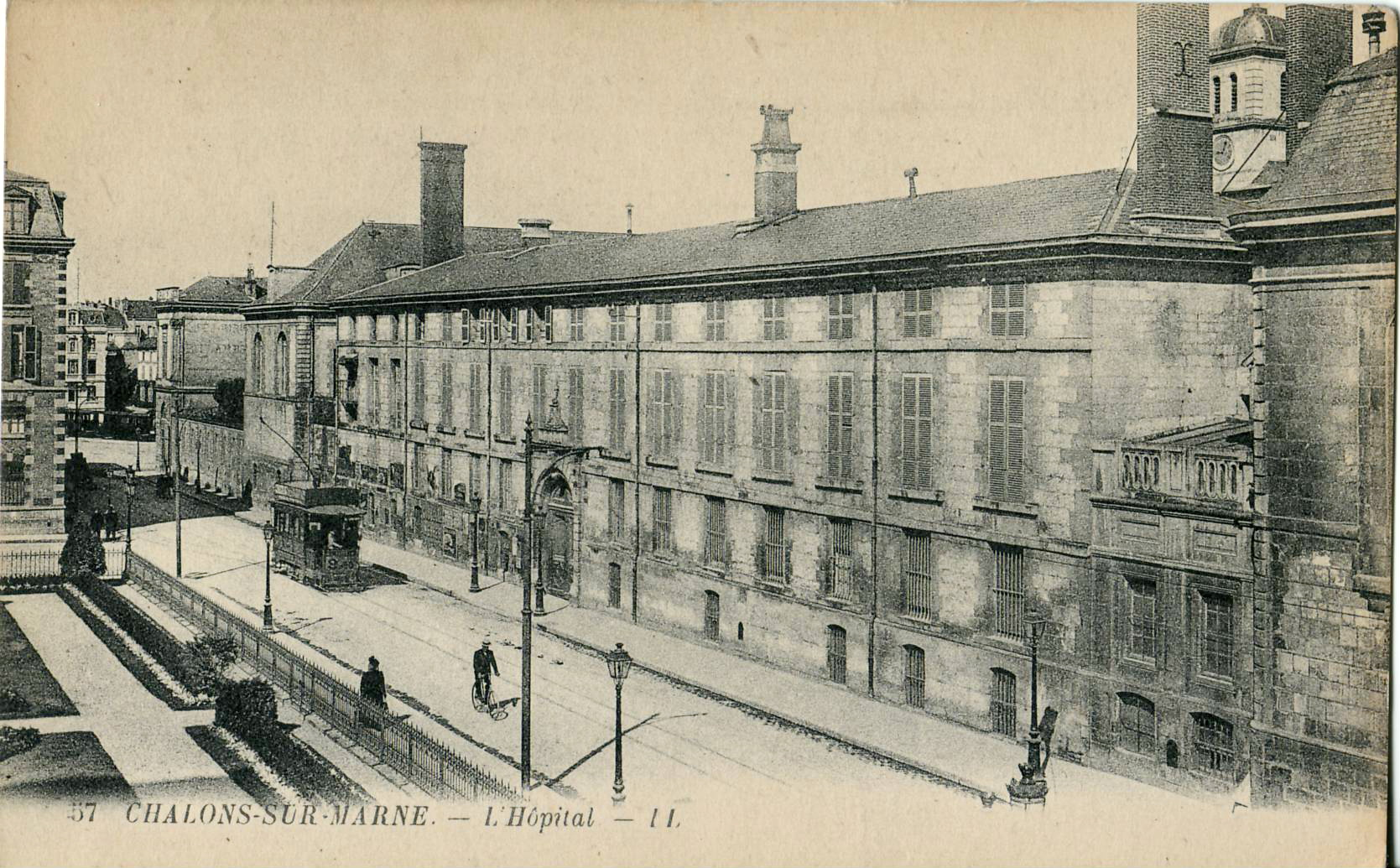 Carte postale ancienne éditée par LL, n°57, le rue de la Marne : Hôtel-Dieu Saint-Étienne - L'Hôpital.